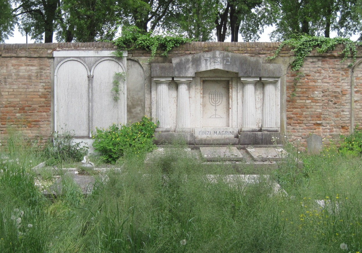 Tombe Cimitero Ebraico Ferrara